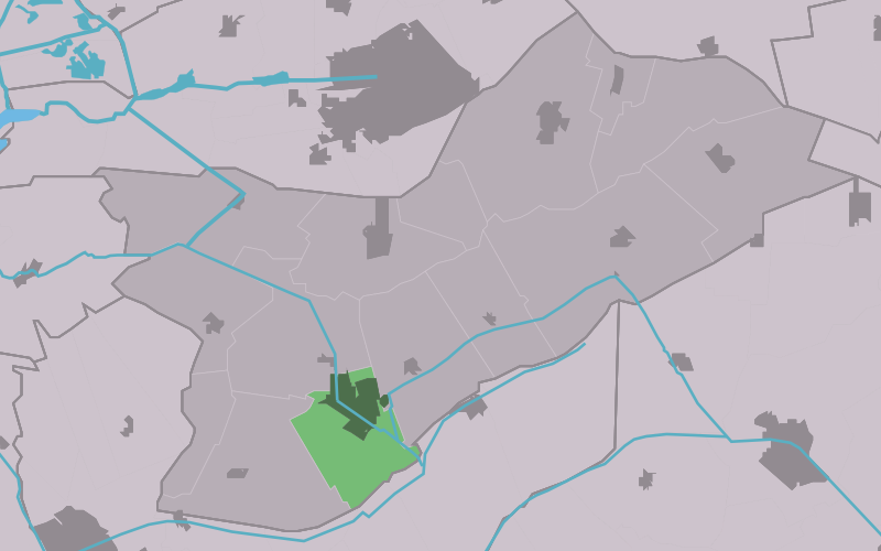 Kaartsje fan himrik fan De Gordyk